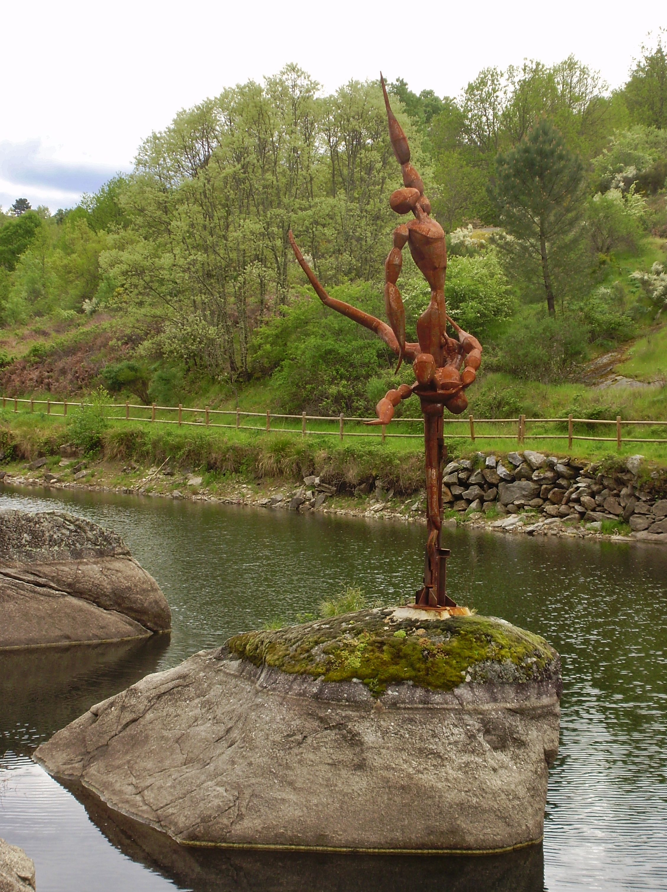 Vista de la escultura «El Baño de Ataecina», representando a las divinidades vetonas de Vaelico y Ataecina en el embalse de Arenas de San Pedro, Ávila, Castilla y León.